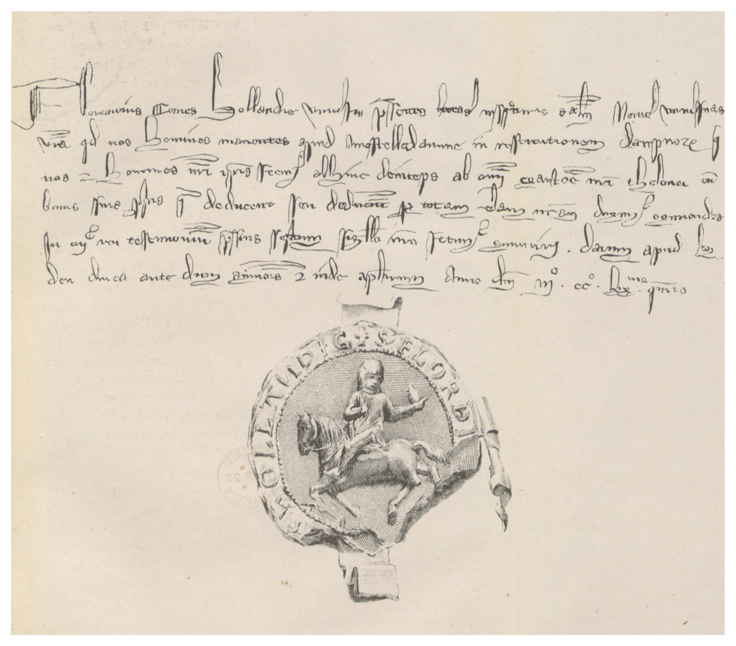 Florentius, comes Hollandie, universis presentes literas inspecturis salutem. Noverit uuiversitas vestra, quod nos homines, manentes apud Amestelledamme, in restitutionem damnorum, que nos et homines nostri ipsis fecimus, abhinc deinceps ab omni exaclione nostri telonii cum bonis suis propriis, que deduceid seu eleclueunt per totam terram nostram, duximus eximendos. In cujus rei testimonium presens scriptum sigillo nosiro fecimus communiri. Datum apud Leyden Dominica ante diem Symonis et Jude apostolorum, anno Domini MCC… ducentesimo septuagesimo quirdo.